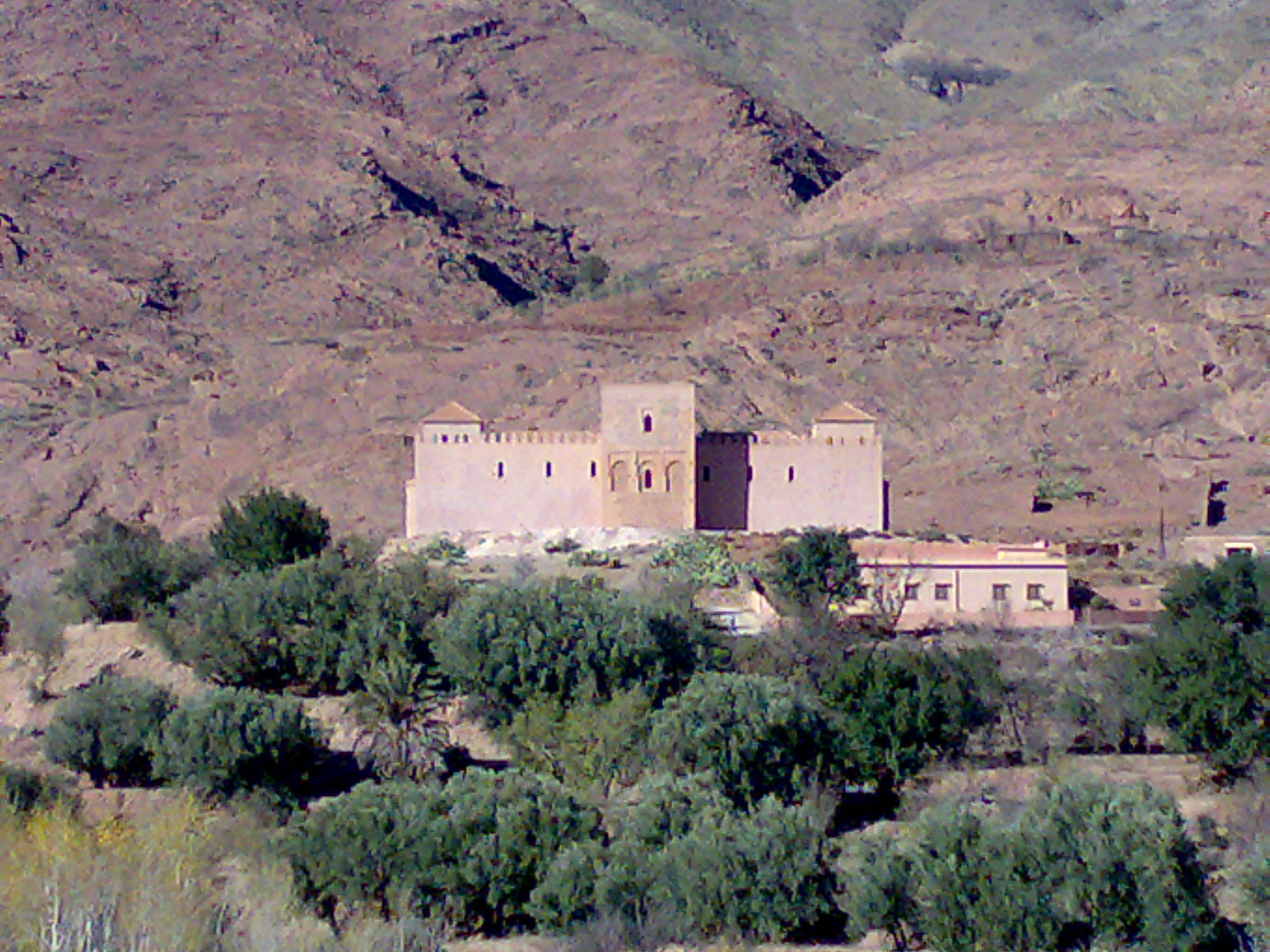 mosquee de tinmel au sud de marrakech